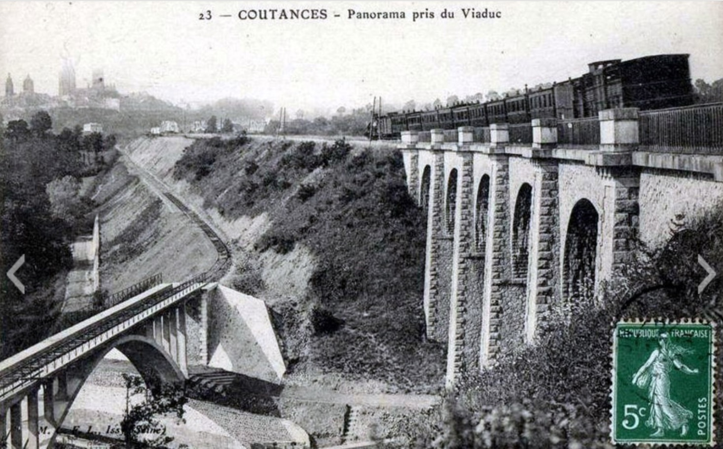 Coutances - Panorama pris du Viaduc